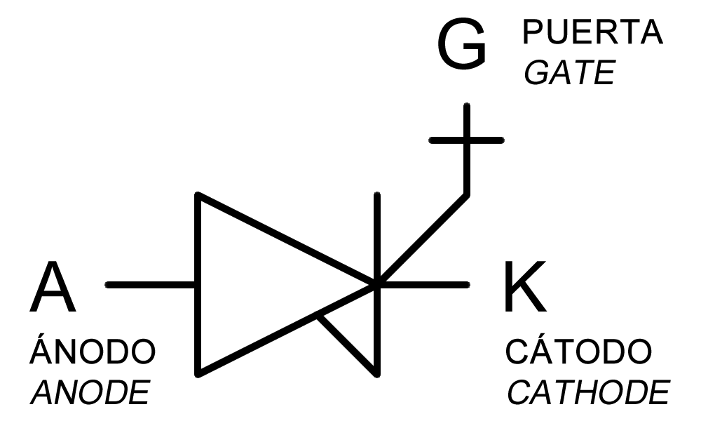 Símbolo electrónico del tiristor IGTC